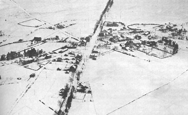 Noville, Belgium; 1944